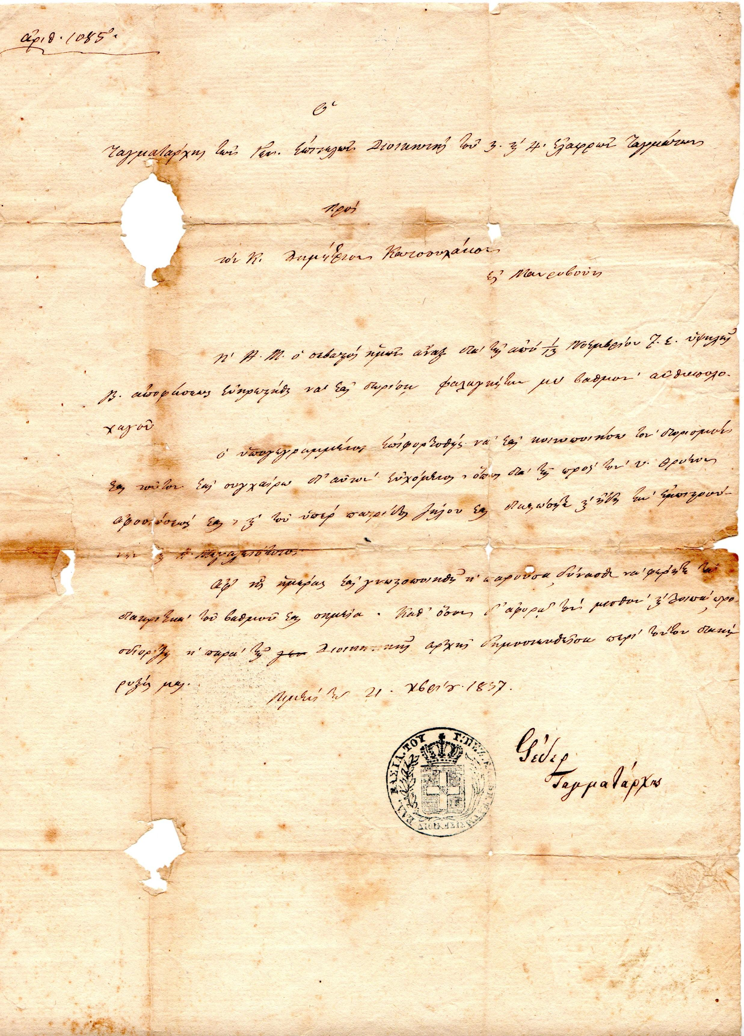 Ο διορισμός του Δημητρίου Κατσουλάκου ως ανθυπολοχαγού της Βασιλικής Φάλαγγας (1837)